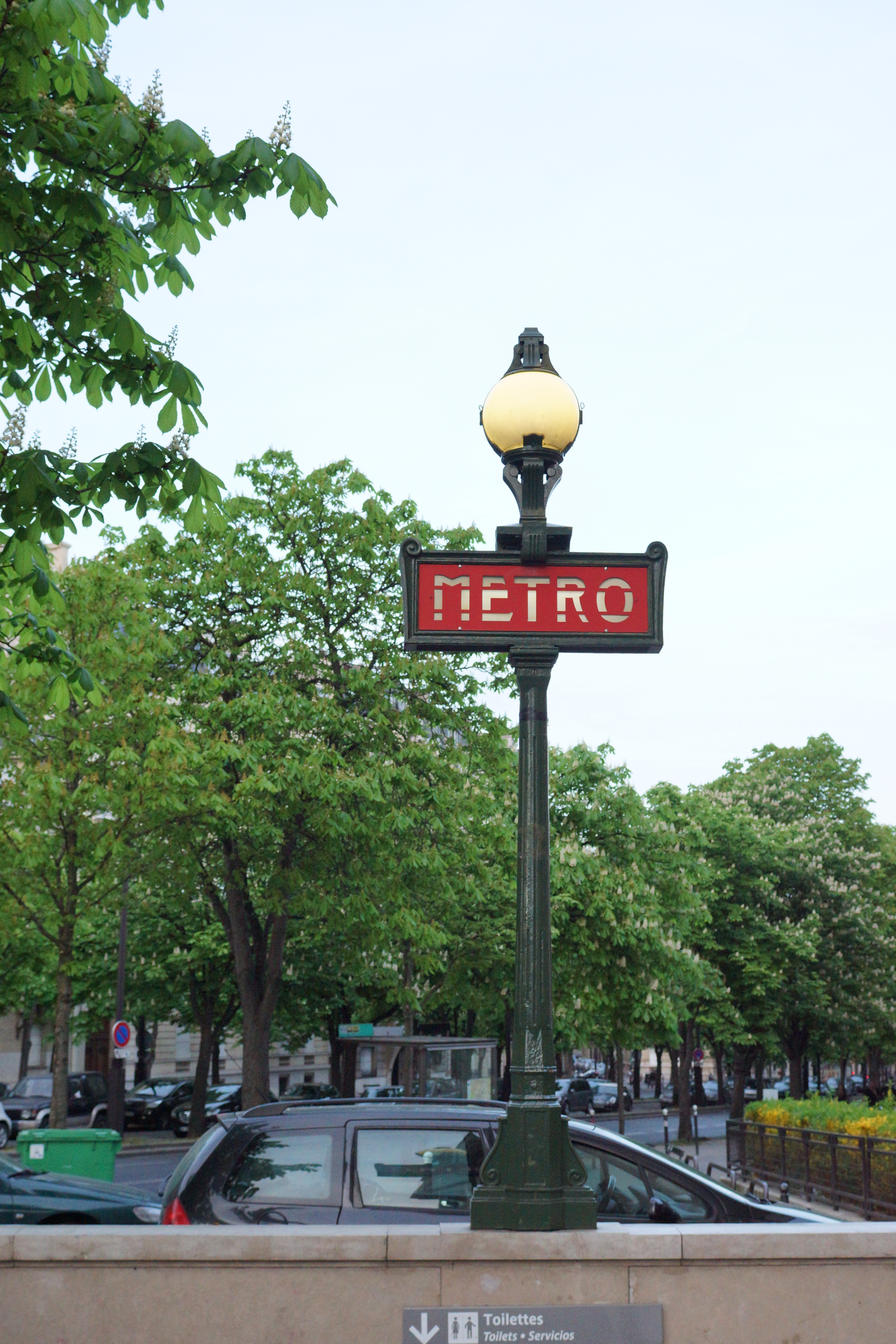 Trocadéro metro station, Paris.